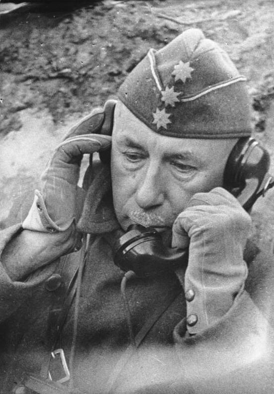 Walther Lucht Bei der Legion Condor. Der Artilleriekommandeur Oberst Lucht gibt durch Fernsprecher den Befehl zum Einsatz einer Aufklärungsmaschine, welche eine feindliche Batterie erkunden soll. (In den letzten Kämpfen bei Toledo Ende März 39). E 20611/39. Scherl Bilderdienst Dr.Franz. 4153/39. [Oberst, später General der Artillerie Walther (auch: Walter) Lucht] Abgebildete Personen: Lucht, Walther: General der Artillerie, Ritterkreuz (RK), Heer, Deutschland